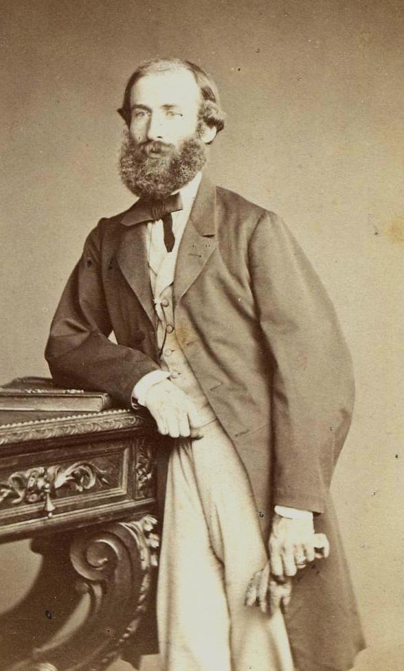 photographie familiale